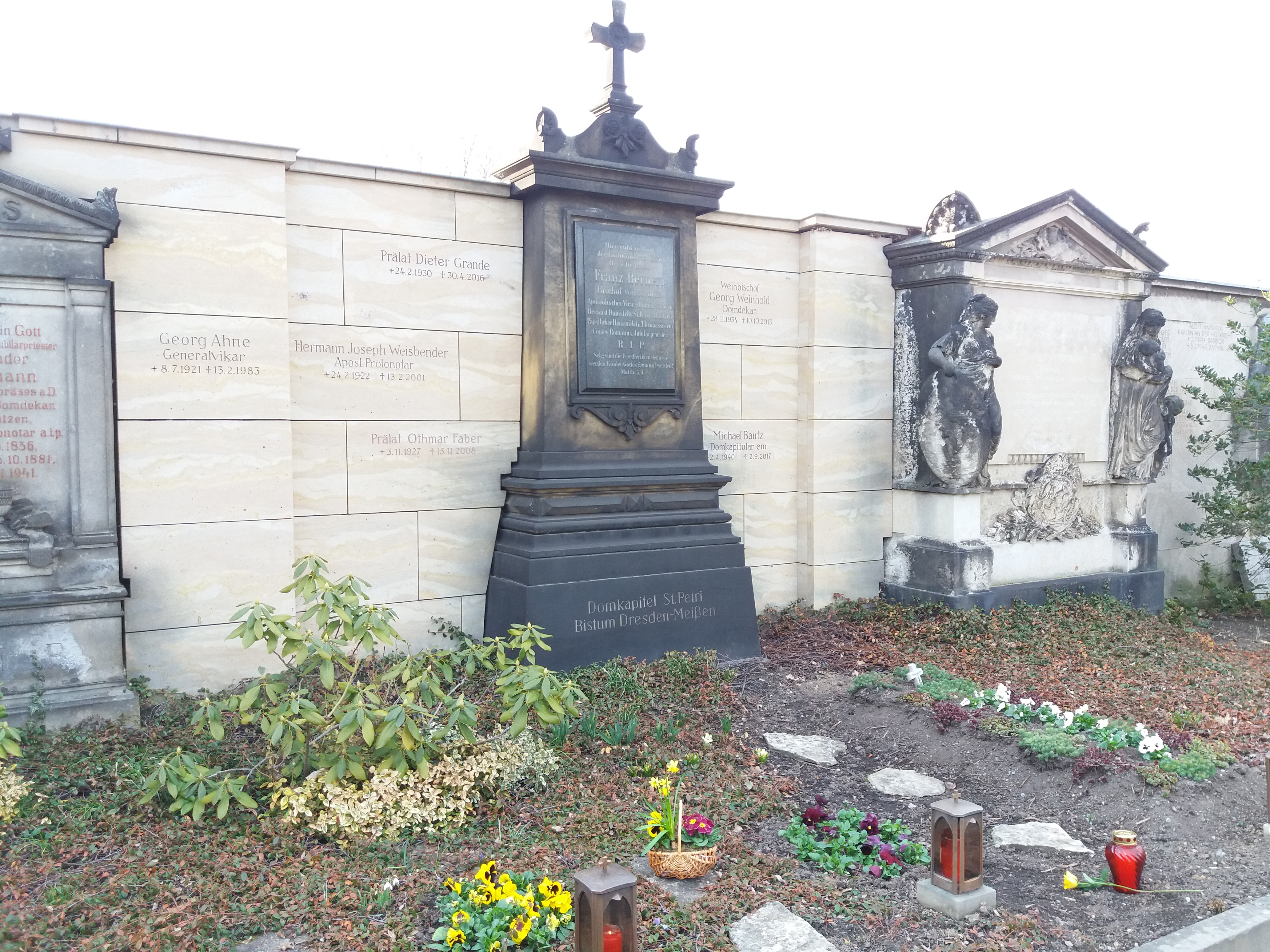 Alter Katholischer Friedhof Dresden. Gruft des Domkapitels St. Petri